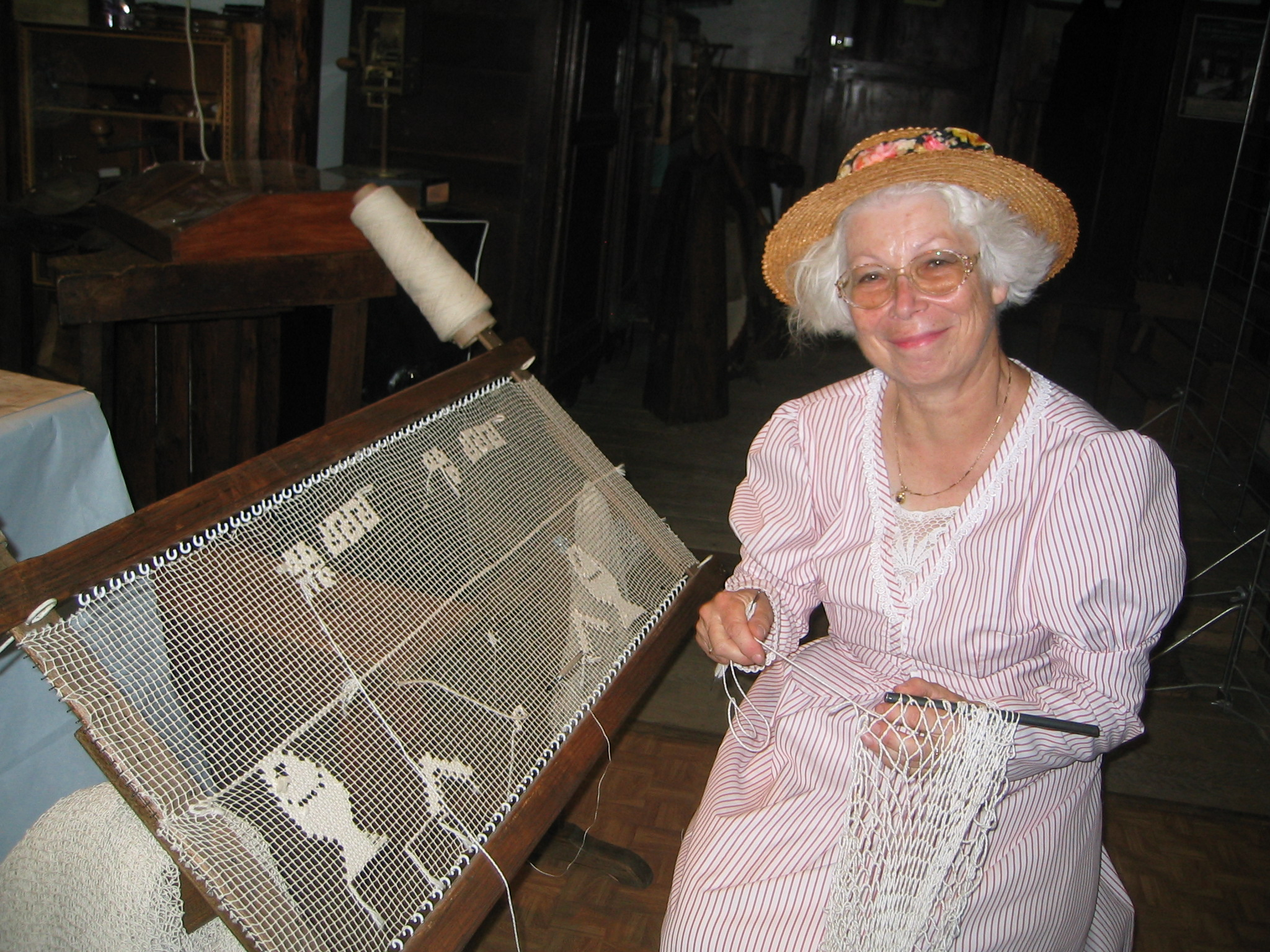 Technique du filet à l'ancienne (ferme-musée de la Soyotte, près de Saint-Dié-des-Vosges)